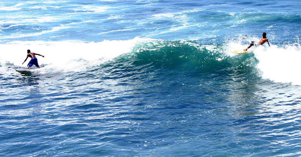 Surfing in La Libertad, El Salvador.